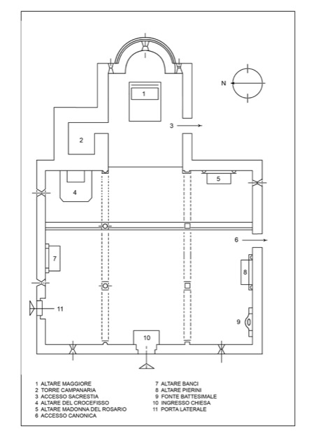 Pianta della Chiesa di San Michele Arcangelo (detta anche chiesa di Sant'Angelo), l'edificio si trova a Cetica frazione del comune di Castel San Niccolò (Ar)